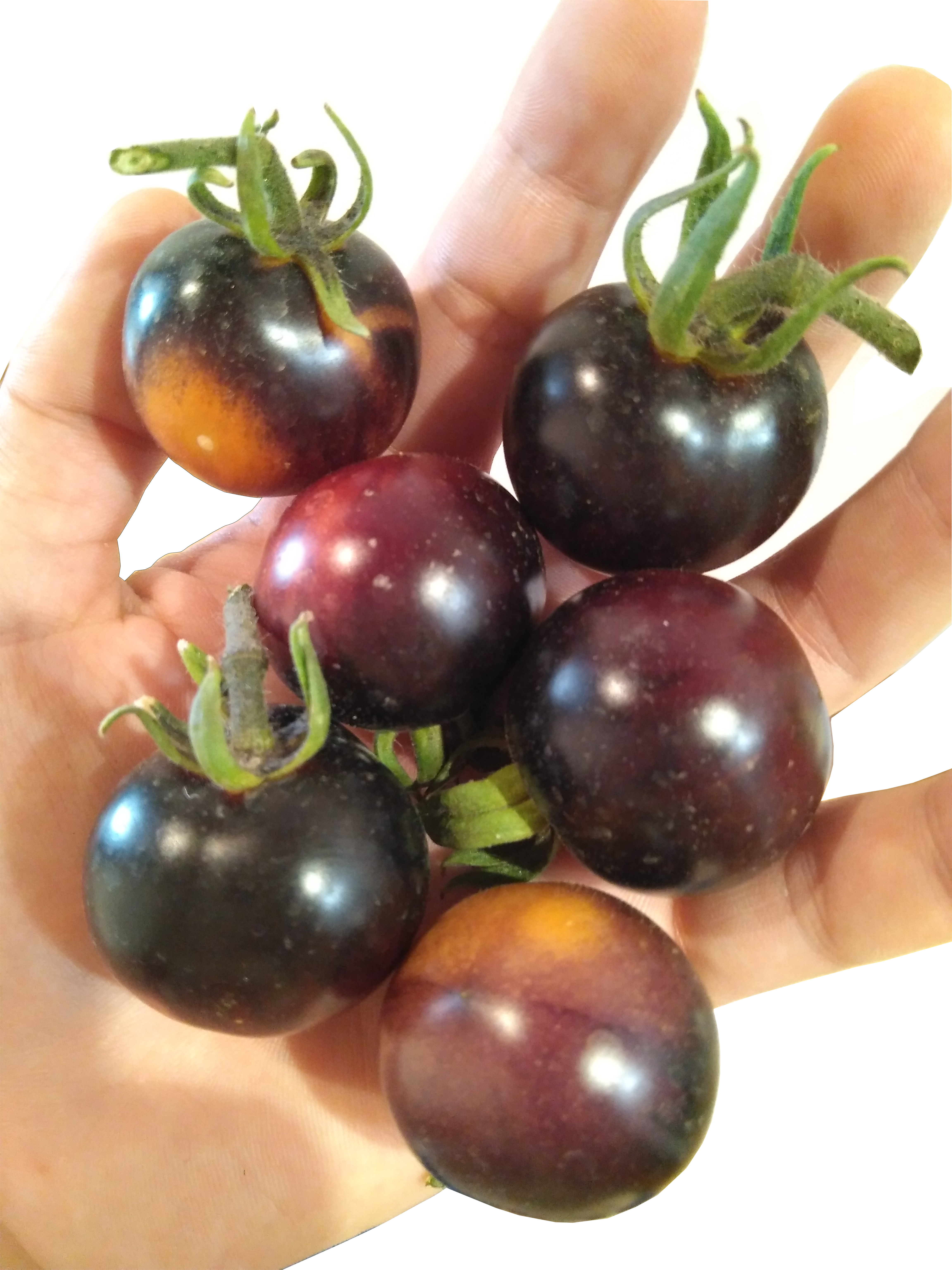 Tomàquets varietat Indigo Rose